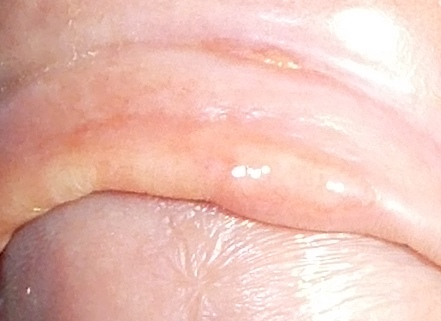 Травмы препуция при фимозе